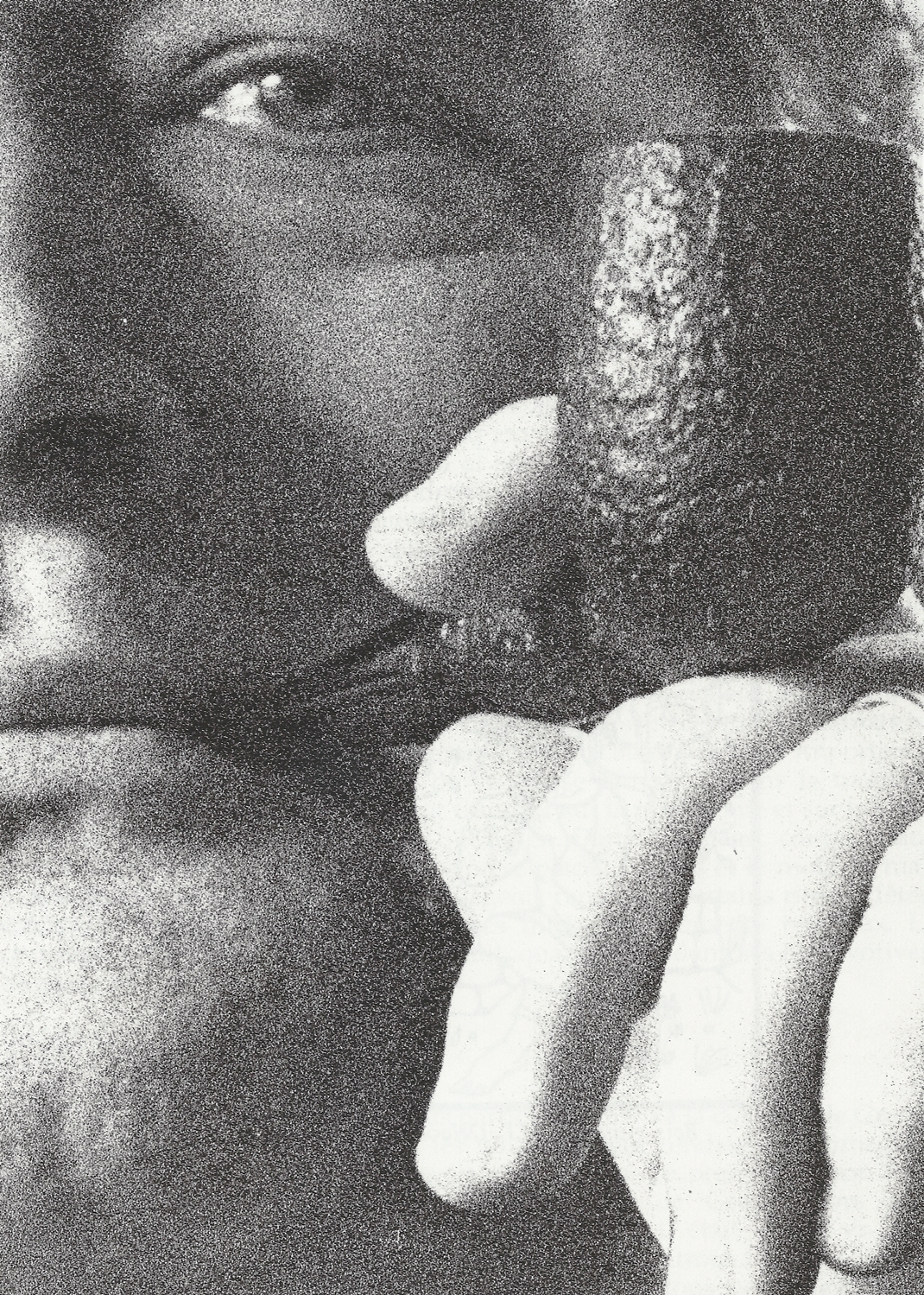 Mas-Felipe Delavouët, photographié par Yves Rigoir